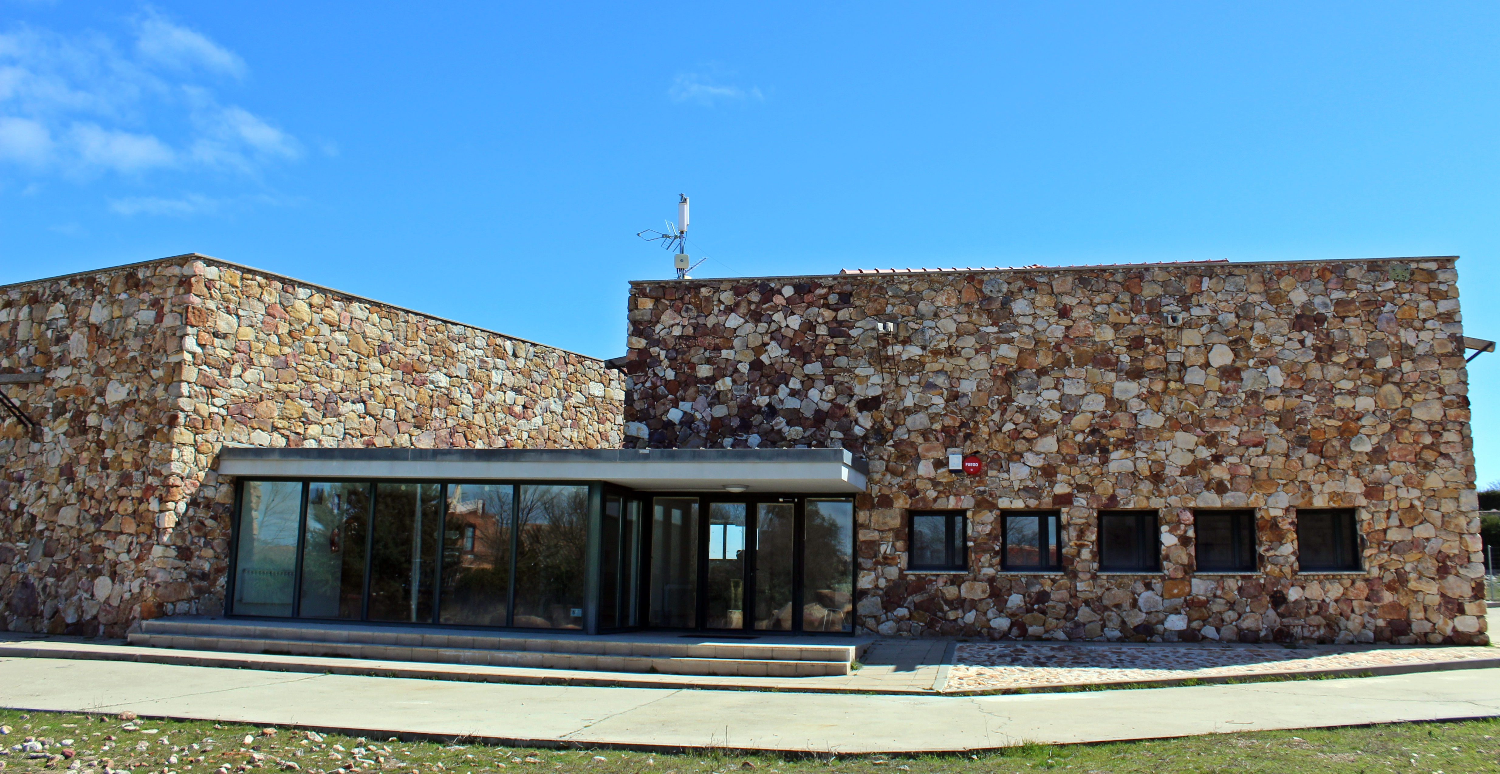 Centro de Promoción y Estudios de la Vía de la Plata y del Viaje en el pueblo de Morille